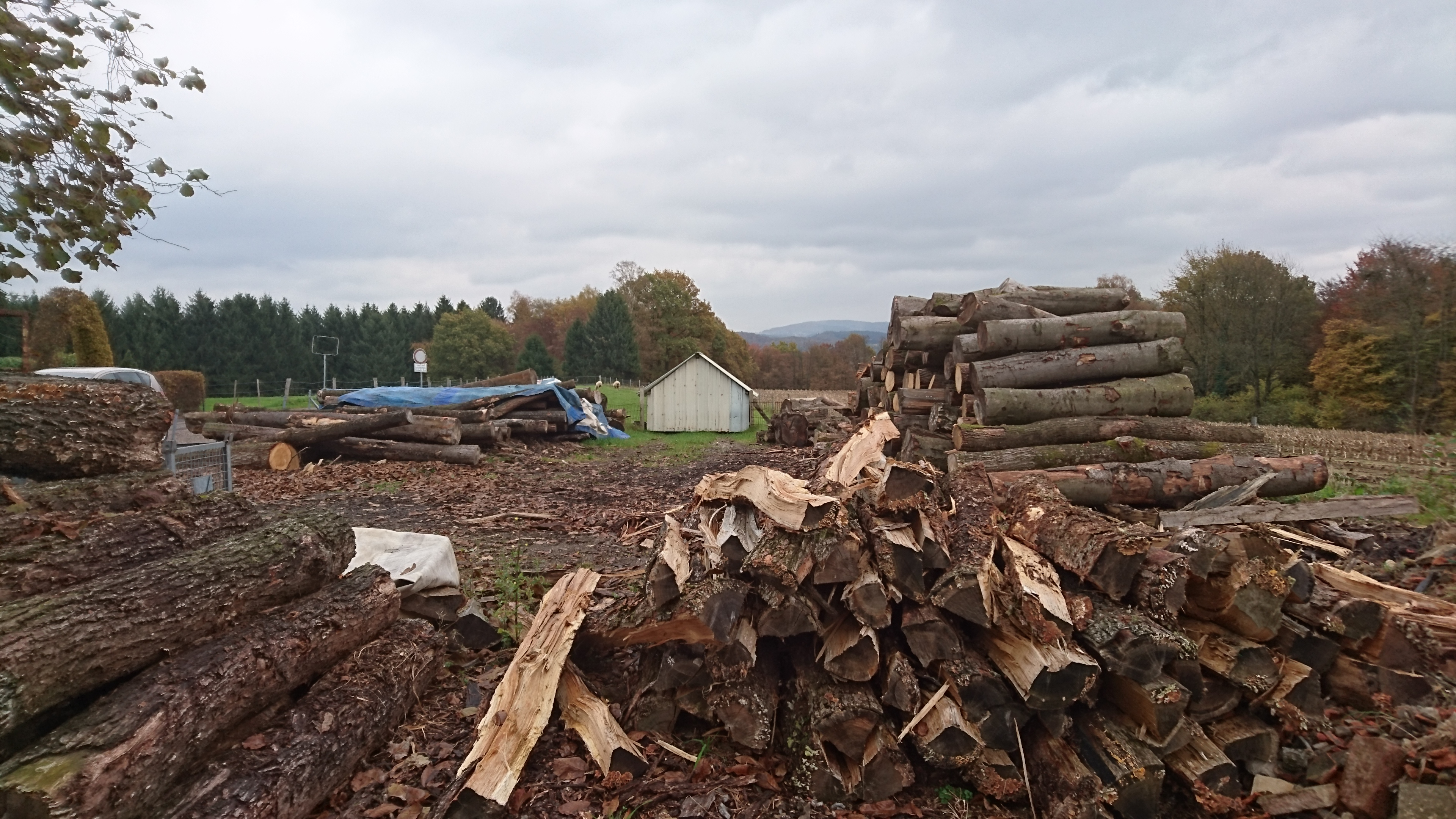 Holzlager in Höderath (Overath)